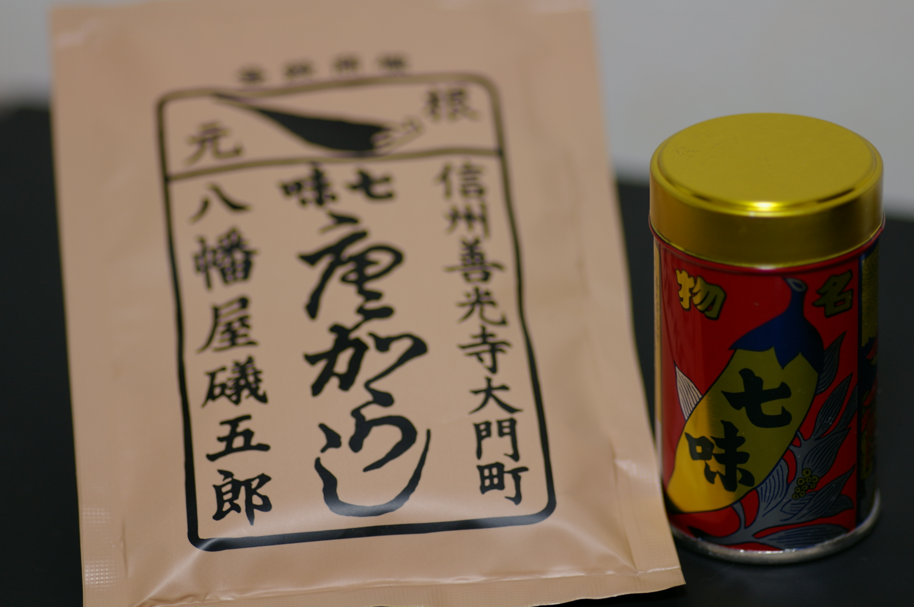 七味唐がらしのパッケージ（長野市柳町102-1に本社のある「八幡屋礒五郎」[1]の七味唐辛子）